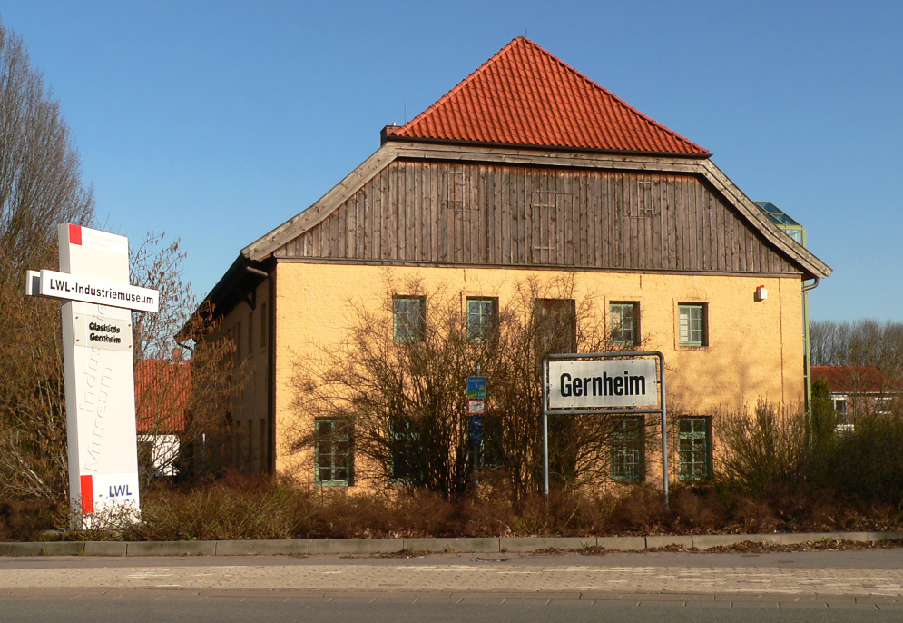 Frühere Korbflechterei der Glashütte Gernheim